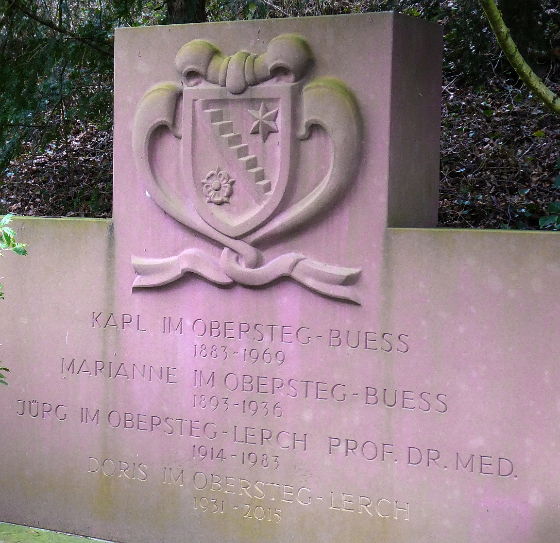 Jürg Im Obersteg-Lerch (1914–1983) Pathologe, Professor Gerichtsarzt am gerichtsmedizinischen Institut in Basel, Kunstsammler Familiengrab auf dem Friedhof Hörnli, Riehen, Basel-Stadt